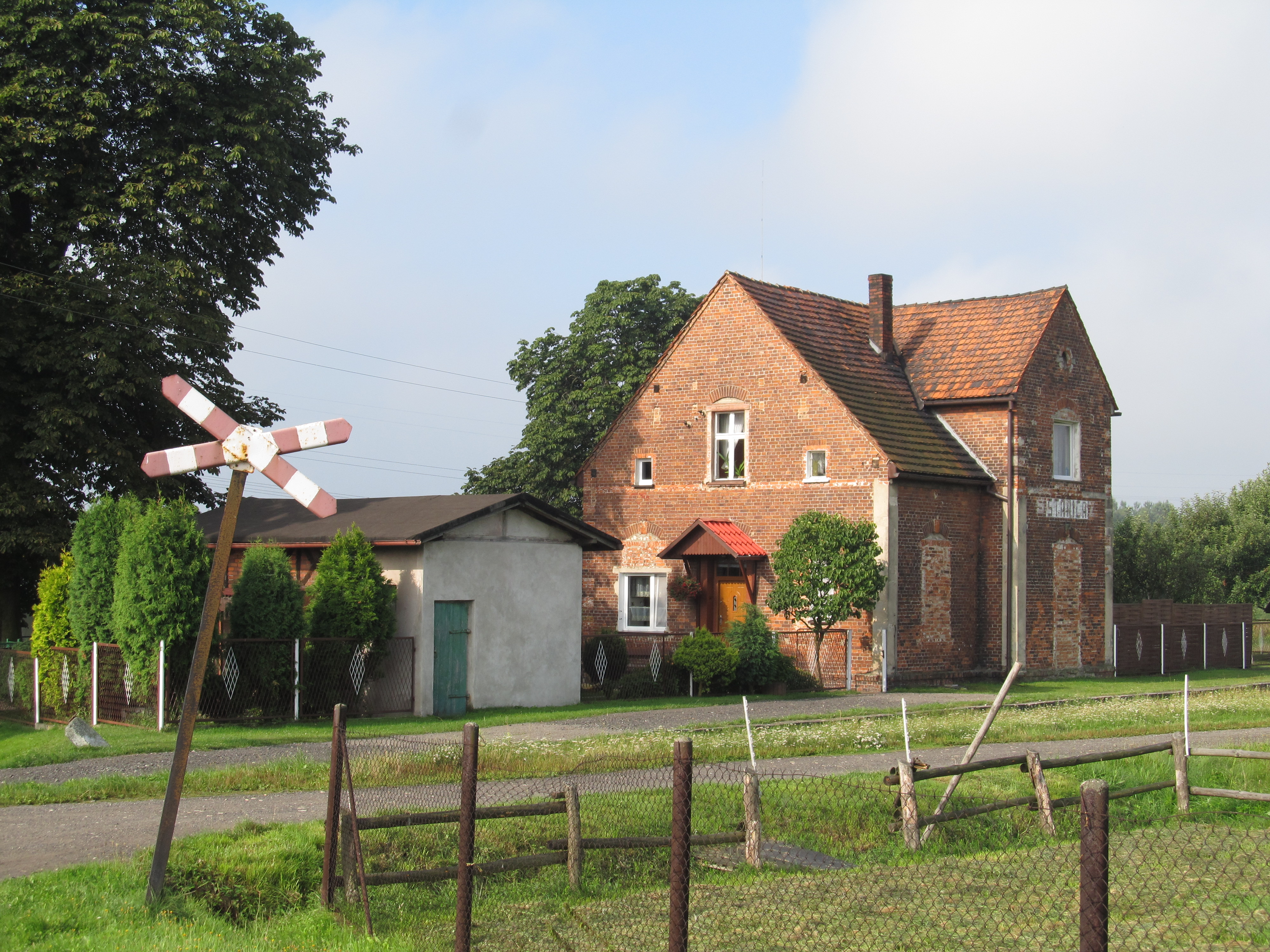 Stanica - budynek dawnego dworca "Stanice Wąskotorowe" kolei wąskotorowej, XIX/XX w. (na linii kolejki wąskotorowej Bytom-Karb-Markowice (odcinek Nieborowice-Pilchowice))